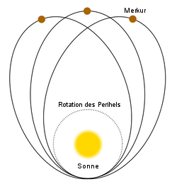 Grafik zur Periheldrehung des Merkur.